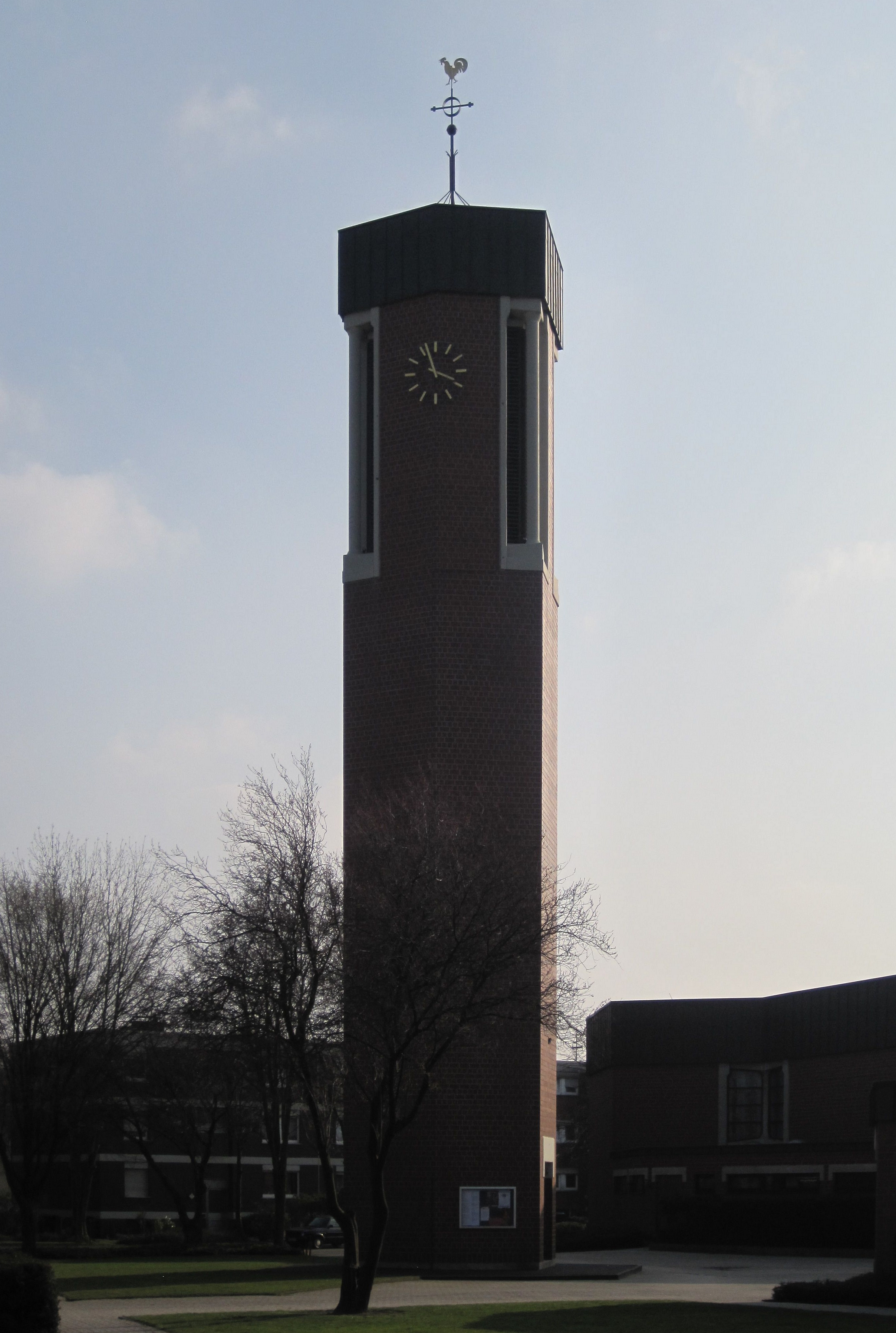 Das Foto zeigt die Christuskirche in Hamm-Bockum-Hövel.